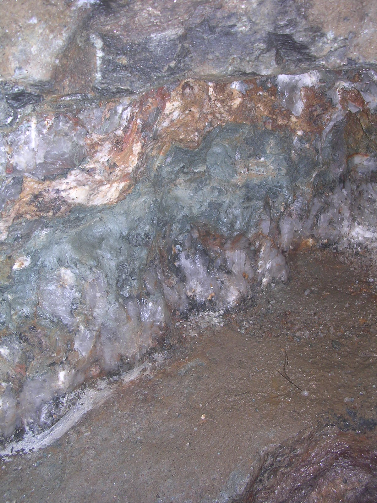 Štola Starý Martin, prohlídková štola, Horní Krupka